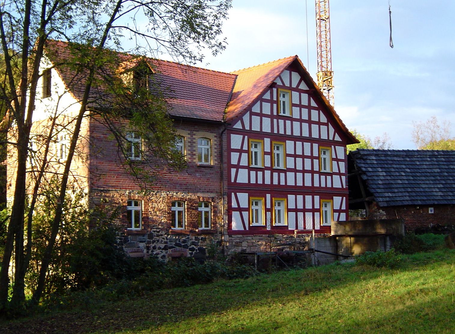 Blick in Richtung Norden auf die Neumühle (Lißberg)